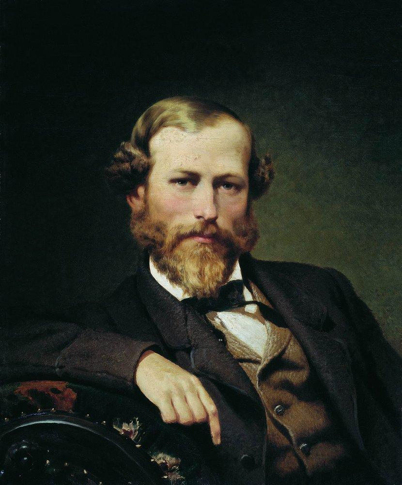 Портрет художника К. Д. Флавицкого Portrait of K.D.Flavitsky